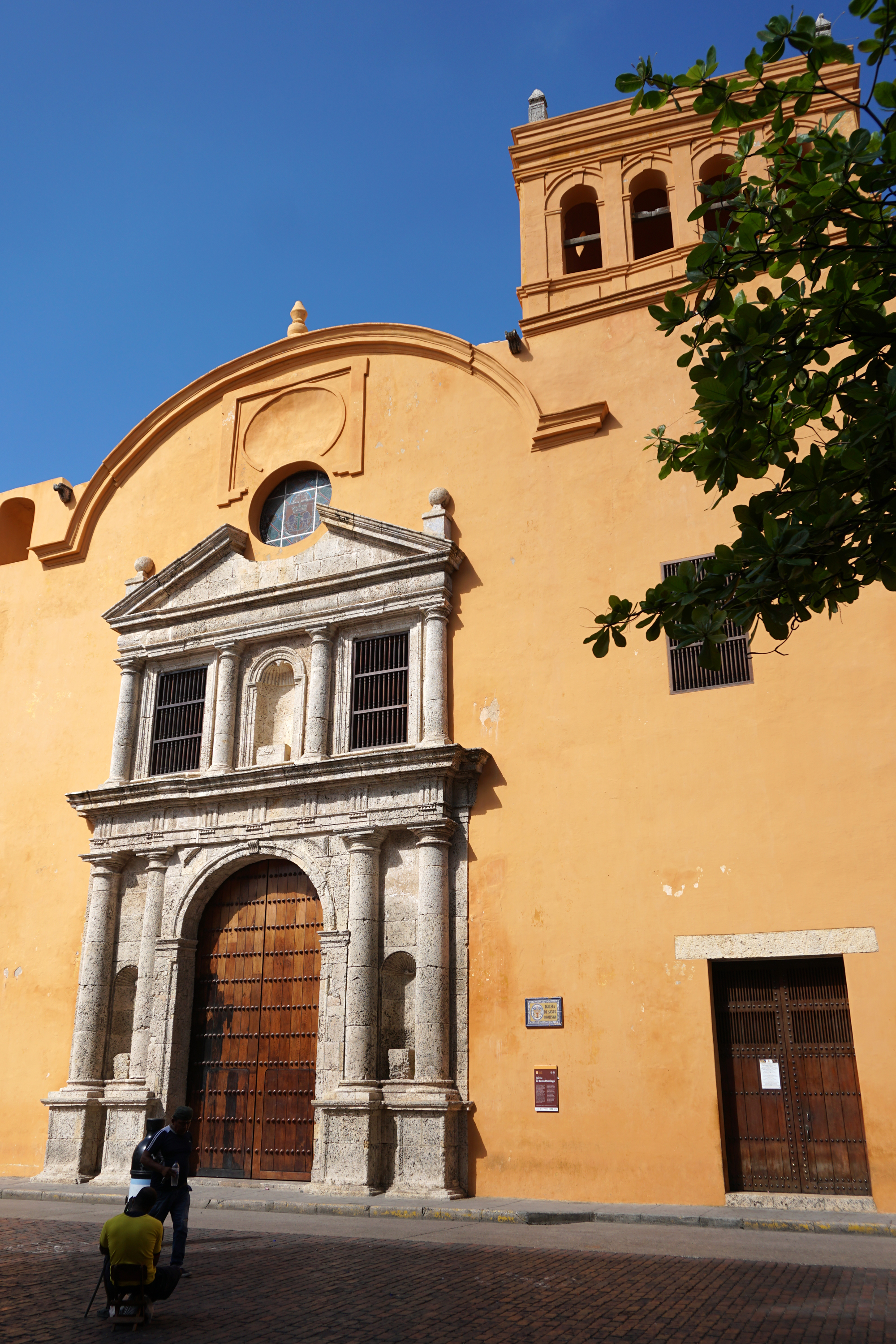 Fachada principal de la Iglesia de Santo Domingo, Cartagena de Indias